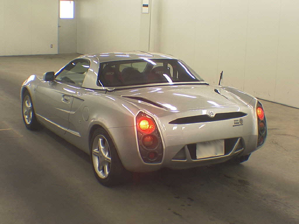 ＶＭ１８０ ザガート Toyota VM180 Zagato